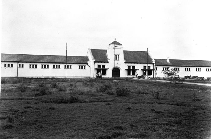 Foto. De gevangenis te Malang op Oost-Java